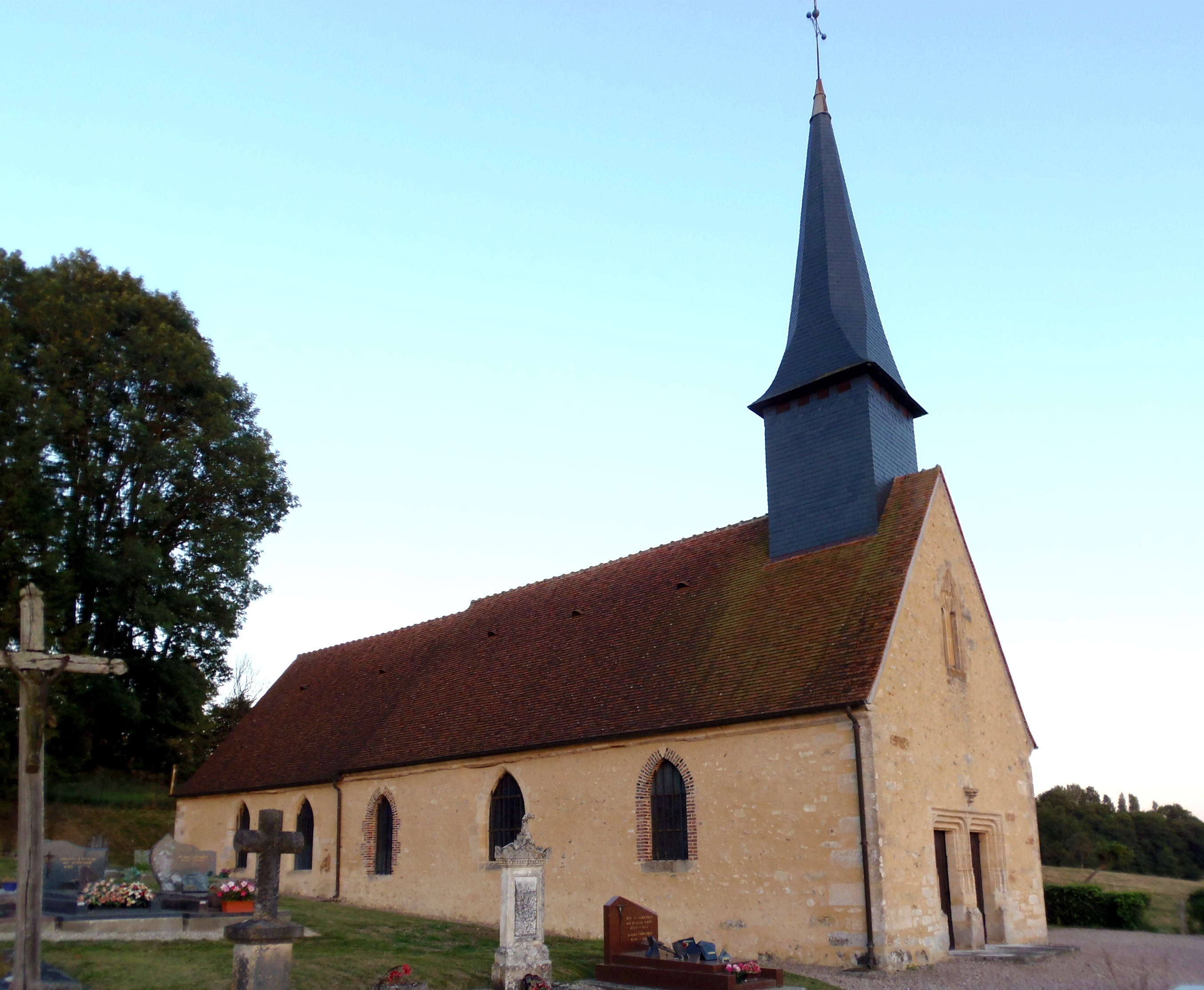 Champosoult (Normandie, France). L'église Saint-Pierre.